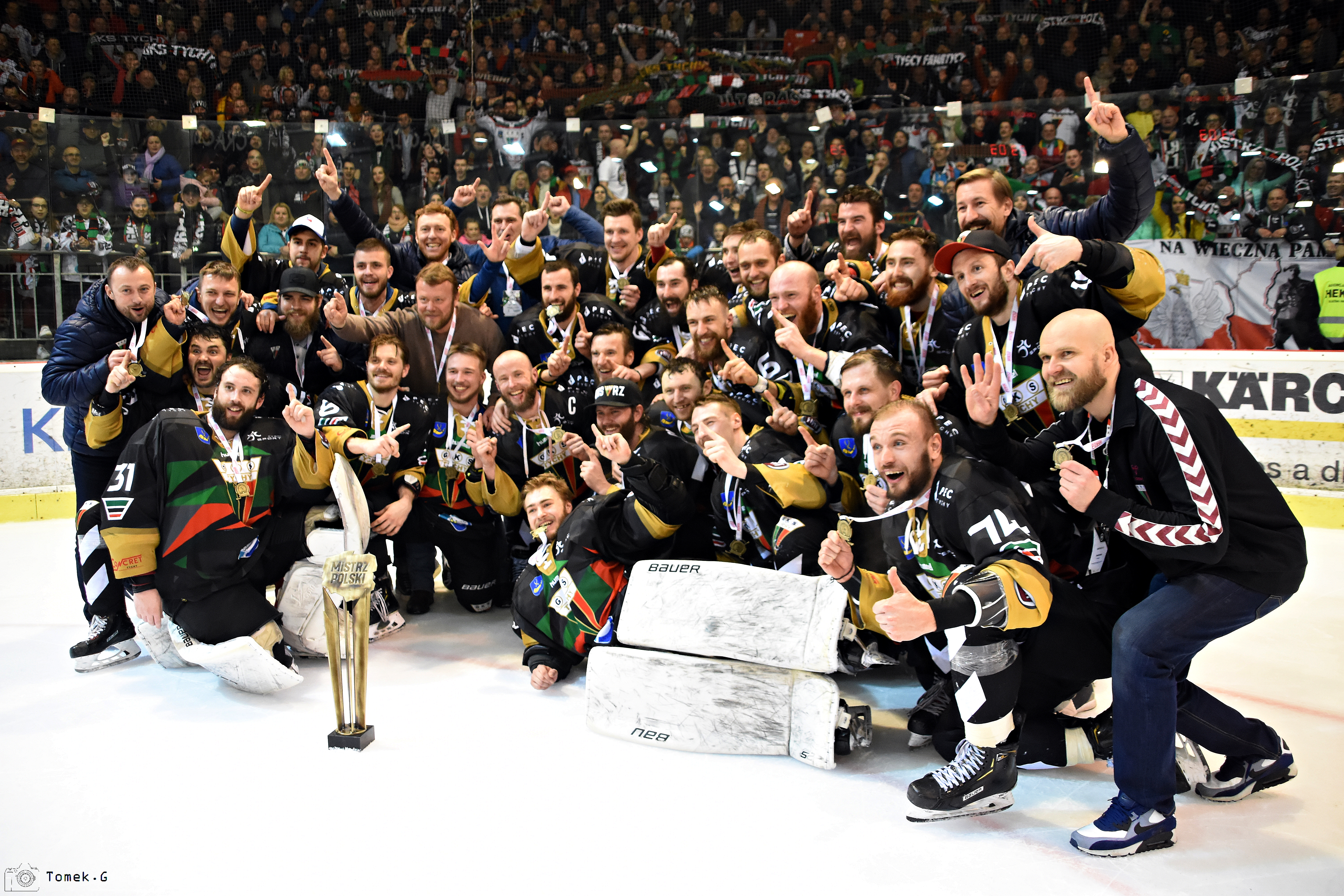 Drużyna GKS-u Tychy świętuje zdobycie Mistrzostwa Polski